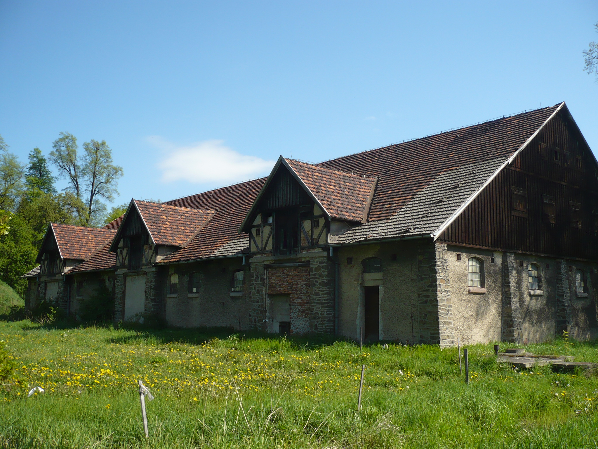 Lubiechów